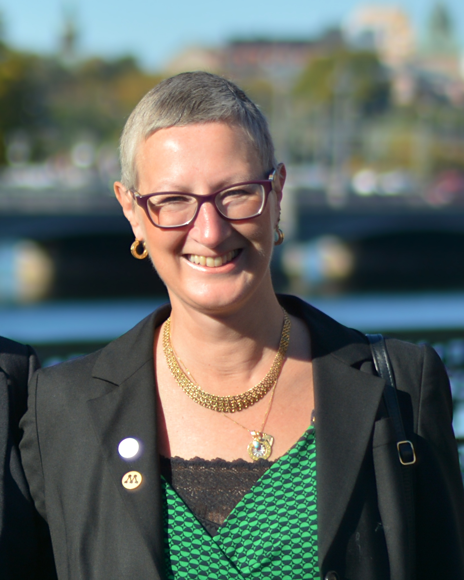 Pia Hallström